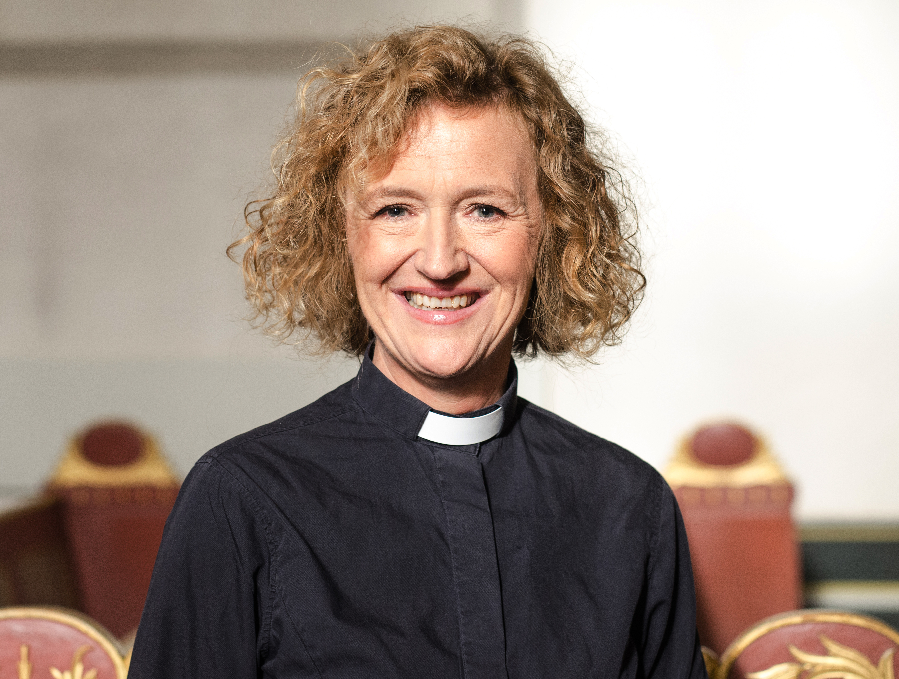 Kari Veiteberg, biskop i Oslo